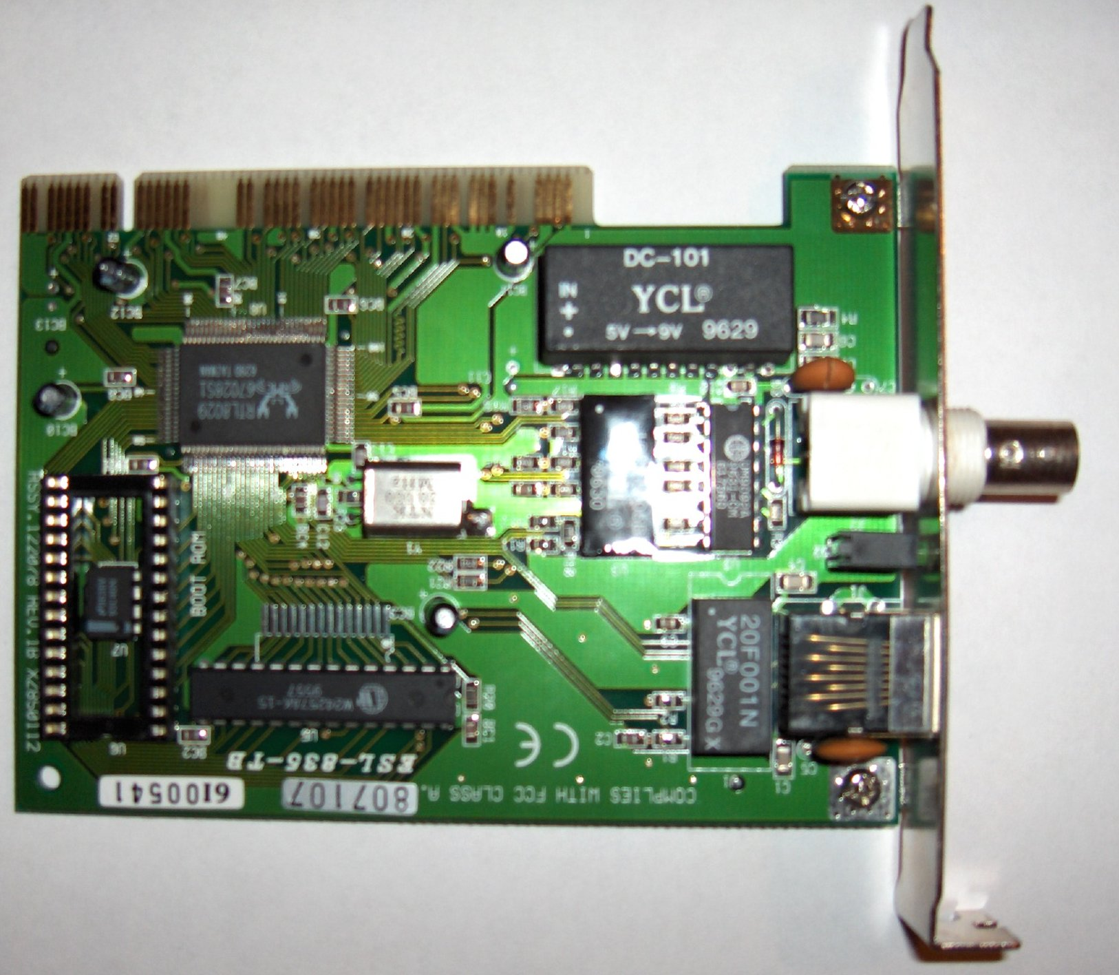 Tarjeta de red PCI 10MB Encore ESL-835-TB Foto tomada por Jorge González. Tarjeta de red PCI